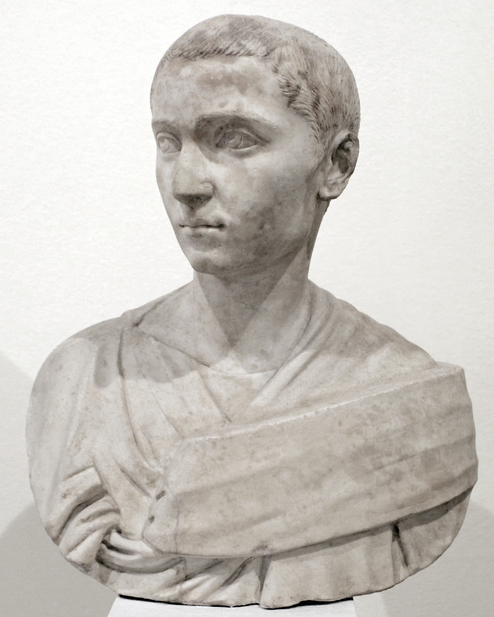 Museo Archeologico Nazionale This is a photo of a monument which is part of cultural heritage of Italy.